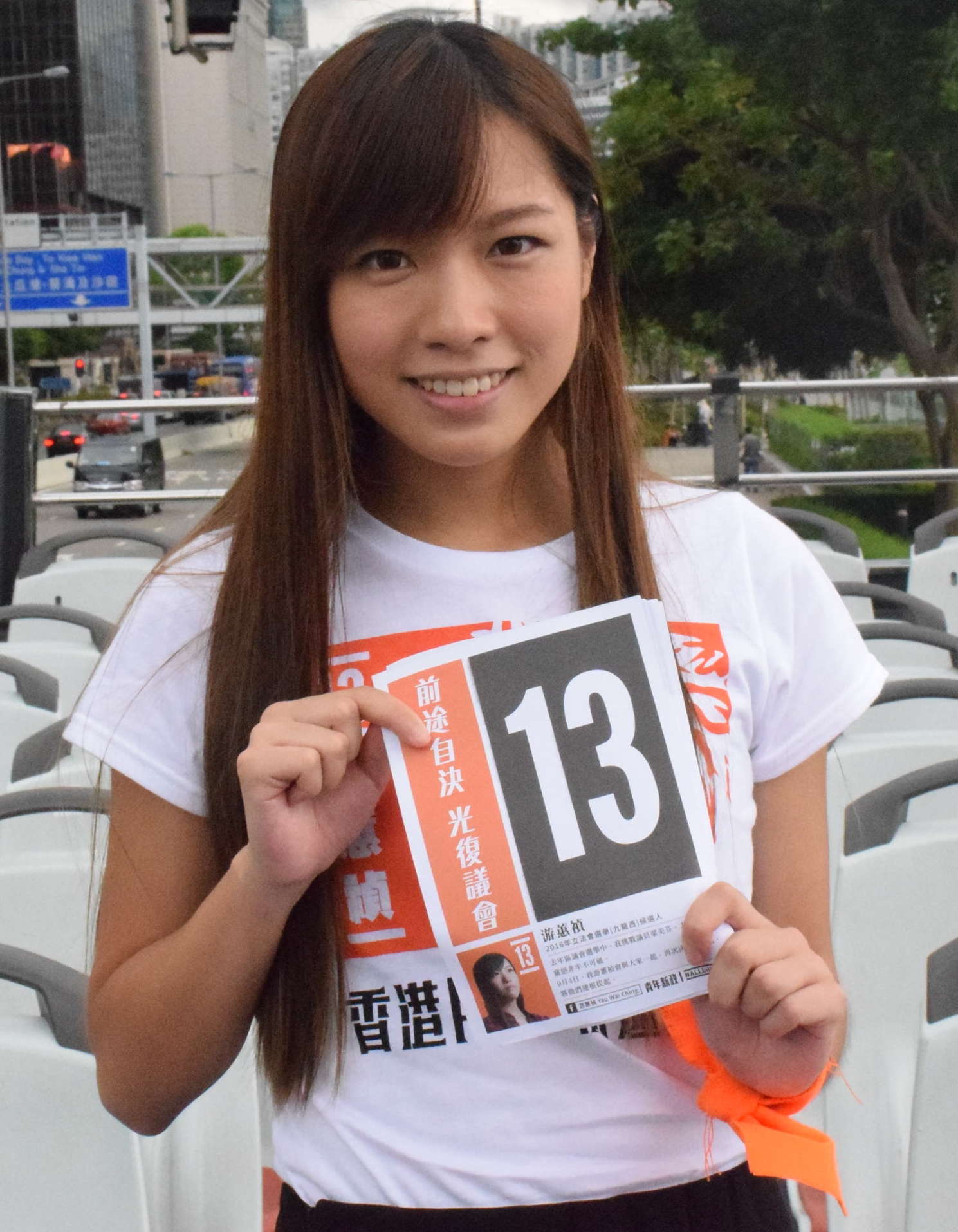 青年新政九龍西地區直選候選人游蕙禎